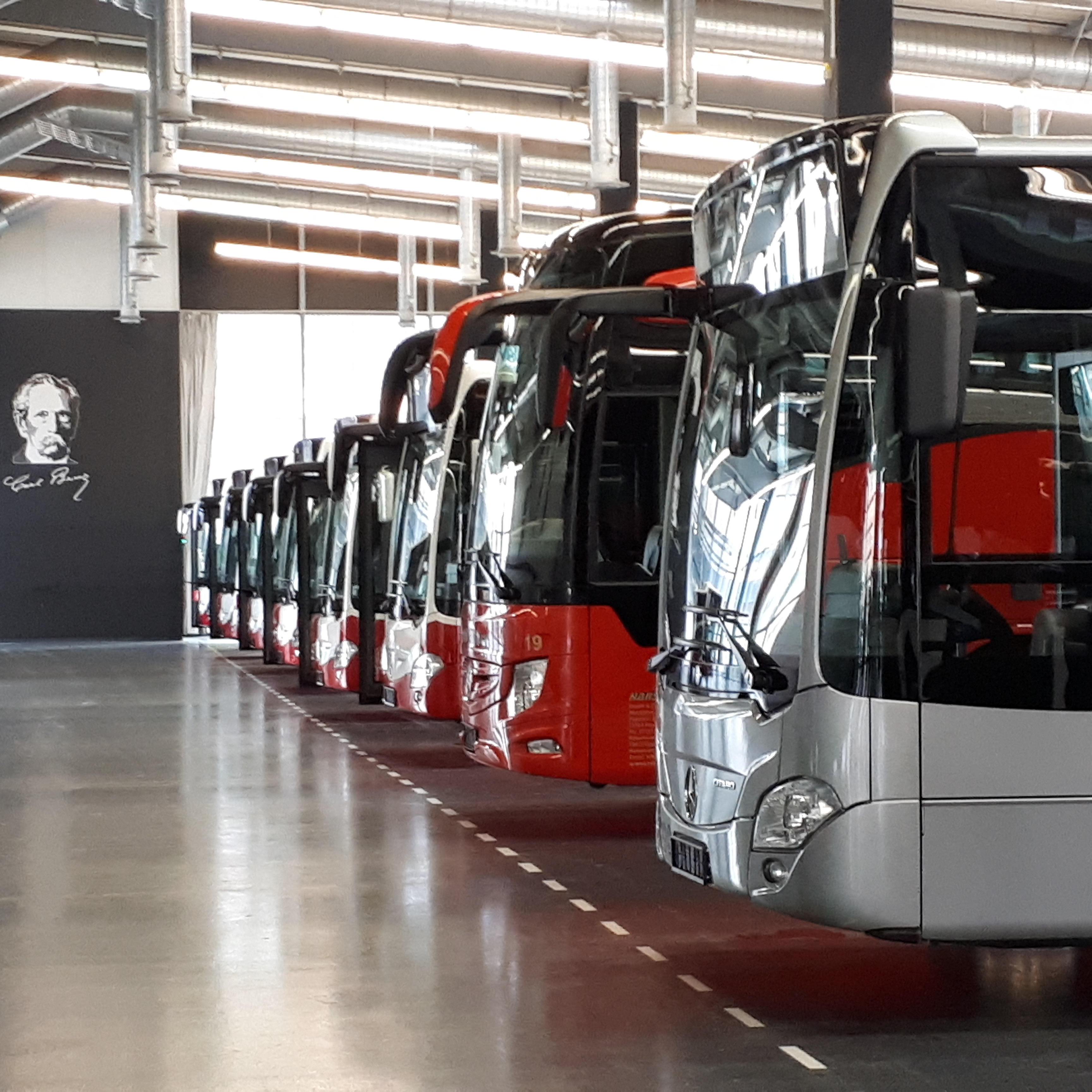 Am 28.3. gemacht, Auslieferungshalle Mercedes Benz Werk Mannheim